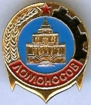 Нагрудный значок "Ломоносов" (Санкт-Петербург)